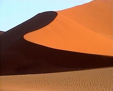 Düne in der Sossusvlei Quelle: selbst fotografiert, gemeinfrei Fotograf: Robert Raderschatt 12:06, 19. Nov 2004 Robert.raderschatt 400 x 326 (95692 Byte) (Düne in der Sossusvlei, Namibia, selbst fotografiert, gemeinfrei)